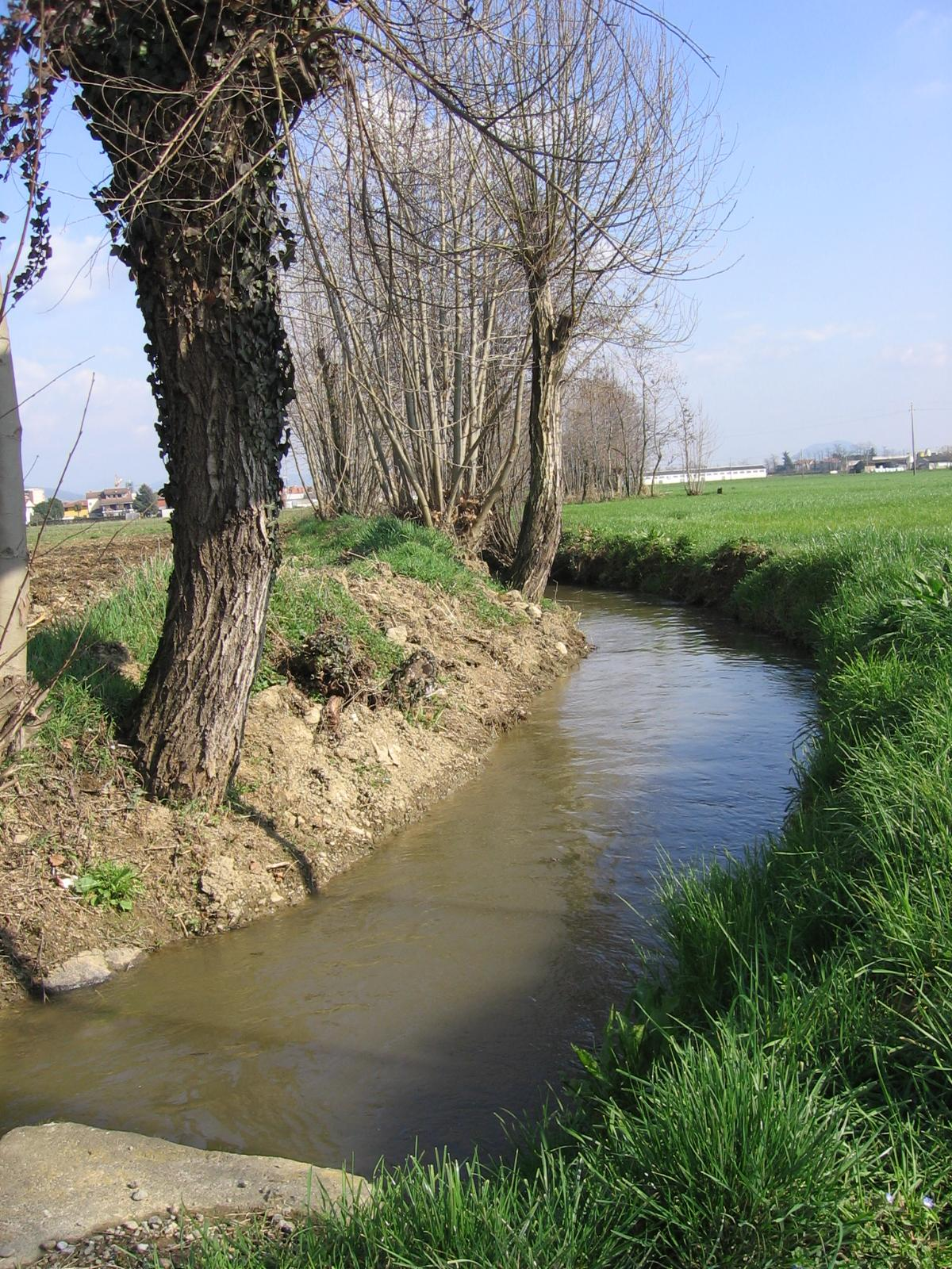 Calcinate, Bergamo, Italia